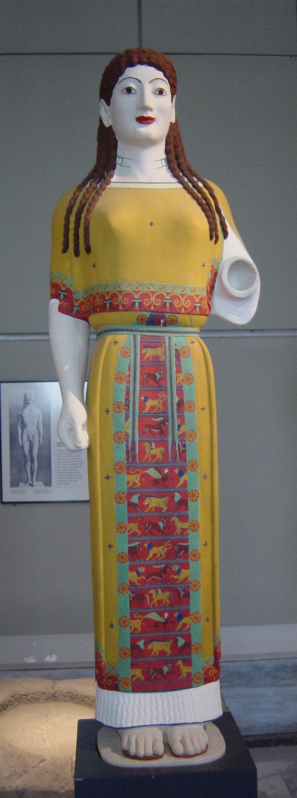 small version of Image:Istanbul - Museo archeologico - Mostra sul colore nell'antichità 02 - Foto G. Dall'Orto 28-5-2006.jpg